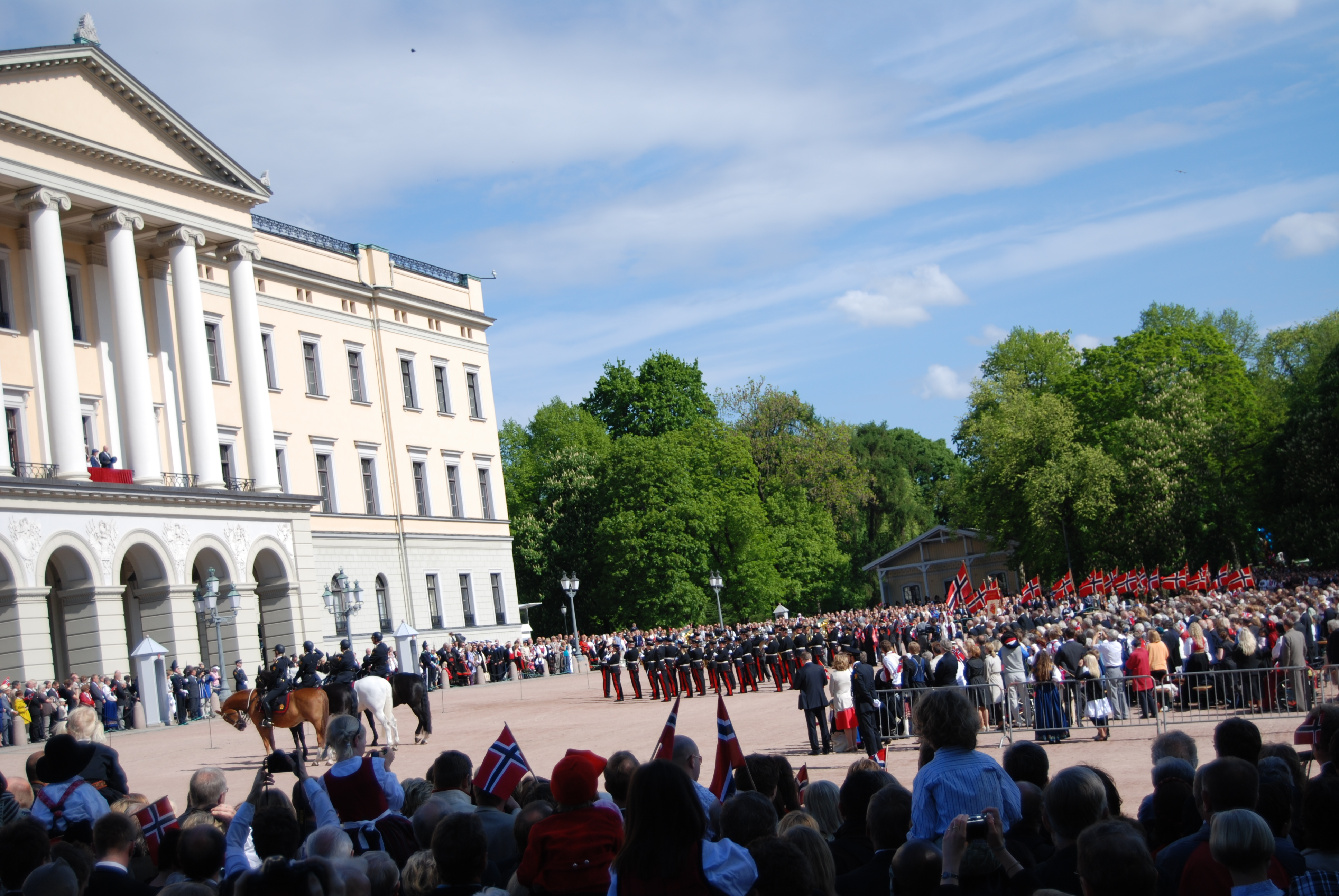 Oslo, parada przed zamkiem królewskim 17 maja 2009